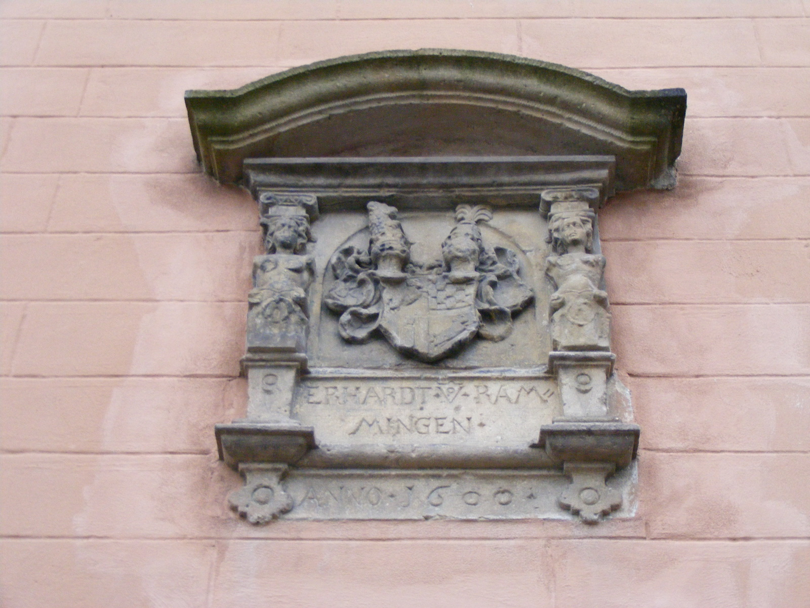 Weißes Haus (Mußbach), Wappen (1600) des Erhardt von Rammingen, in Mußbach